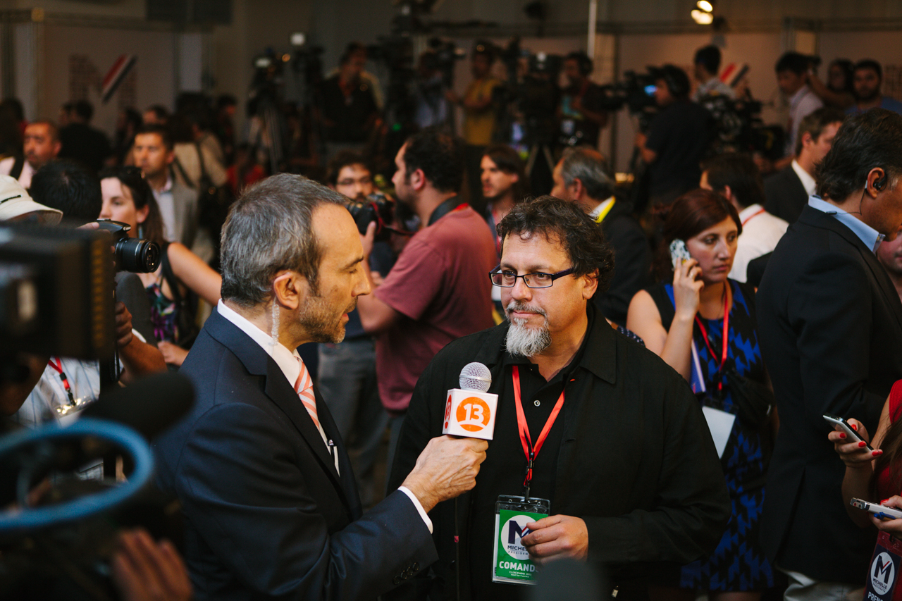 Mauricio Hofmann entrevista a Ricardo Lagos Weber.